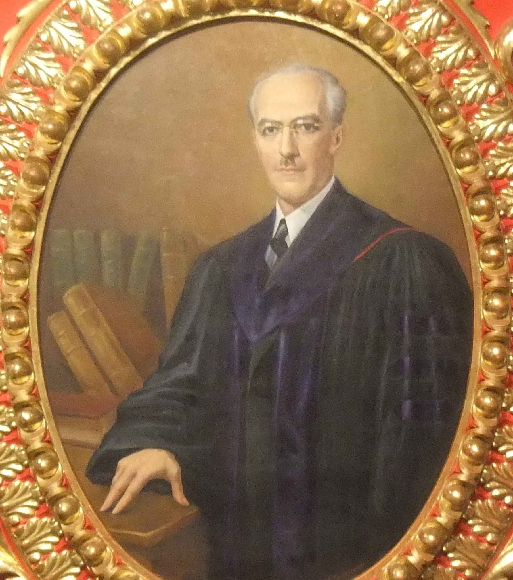 Retrato de Jacinto Jijón y Caamaño, obra del artista ecuatoriano, Enrique Gomezjurado. Museo Nacional del Ecuador.